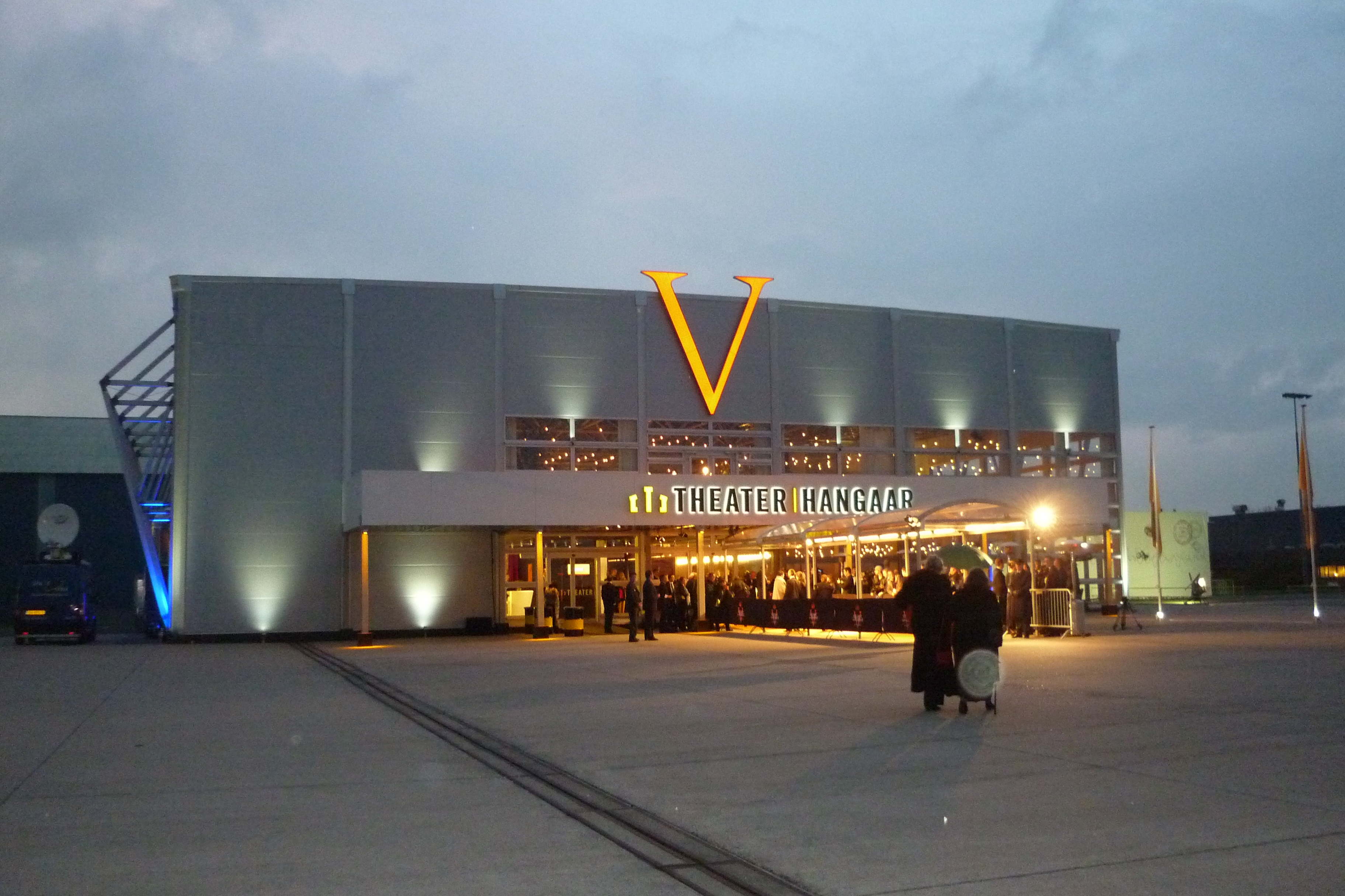 TheaterHangaar op vliegveld Valkenburg, waar de musical Soldaat van Oranje wordt gespeeld